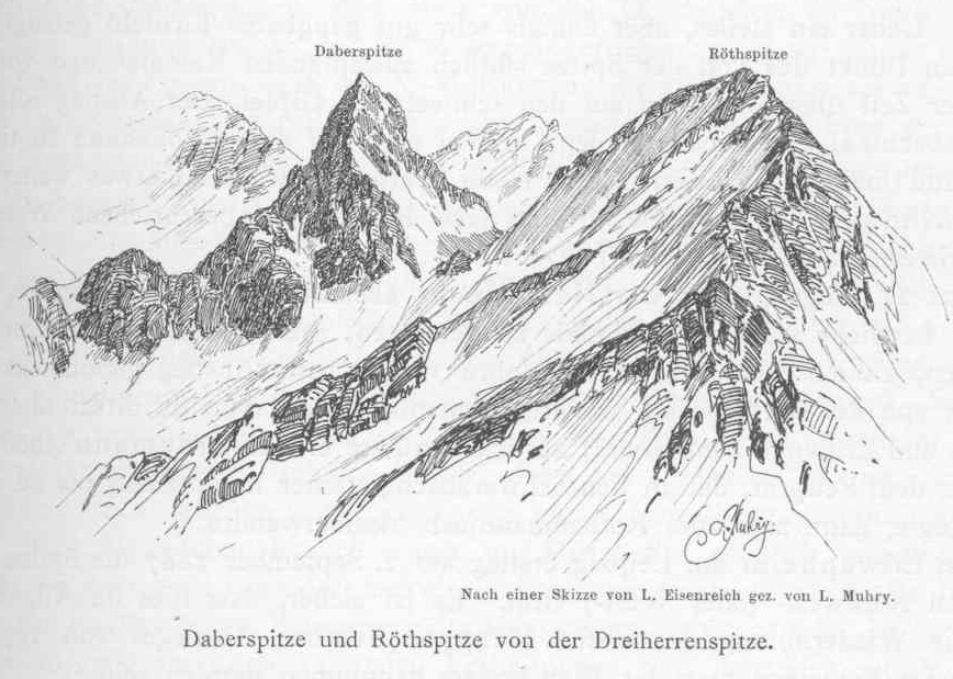 Rötspitze, Daberspitze